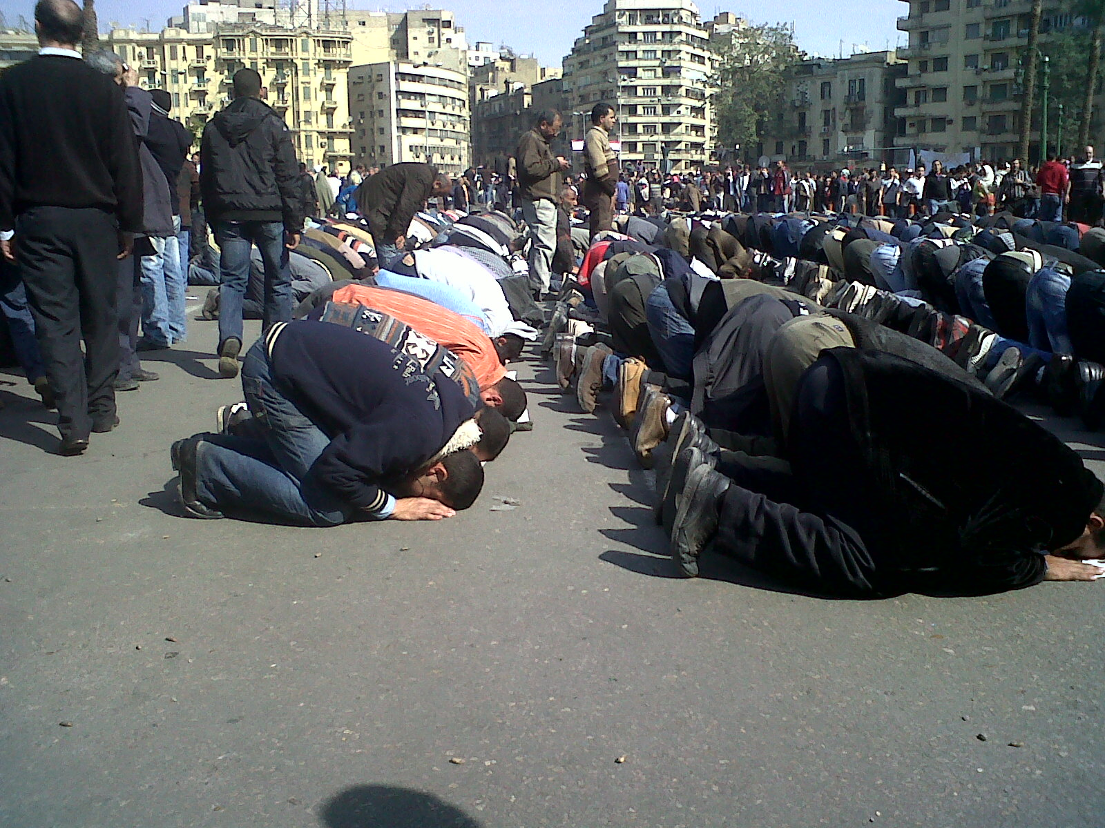 IMG00820-20110201-1219